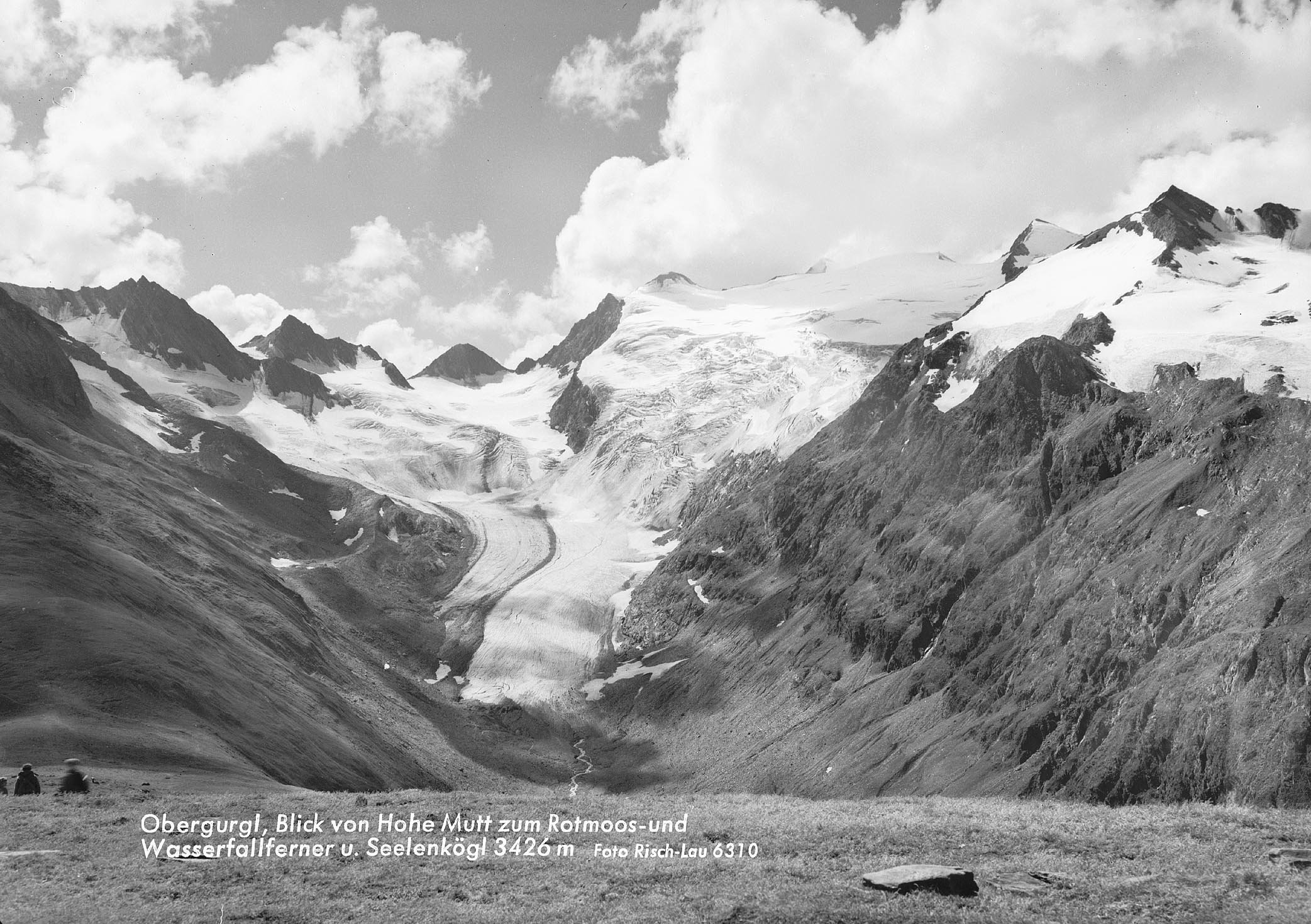 Obergurgl / Blick von der Hohen Mutt zum Rotmoos- und Wasserfallferner und Seelenkögl 3426 m